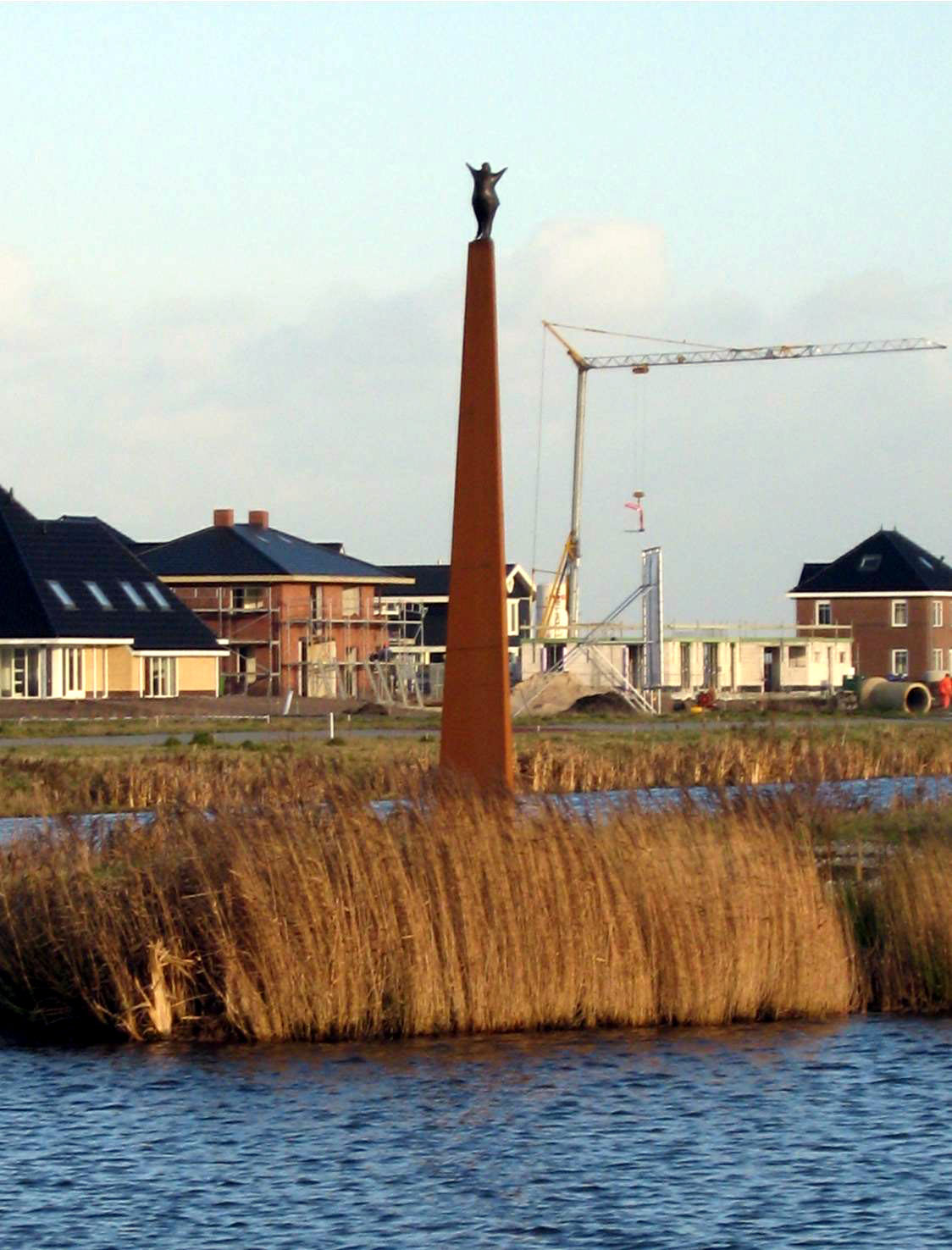 Evert van Hemert,2007